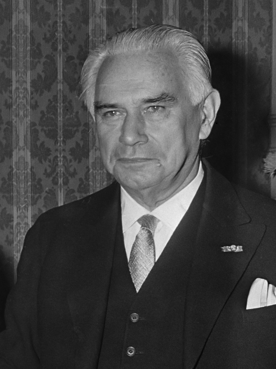 Viering van het 75-jarig bestaan van de ANVV, de Algemene Nederlandse Vereniging voor Vreemdelingenverkeer 17 november 1965